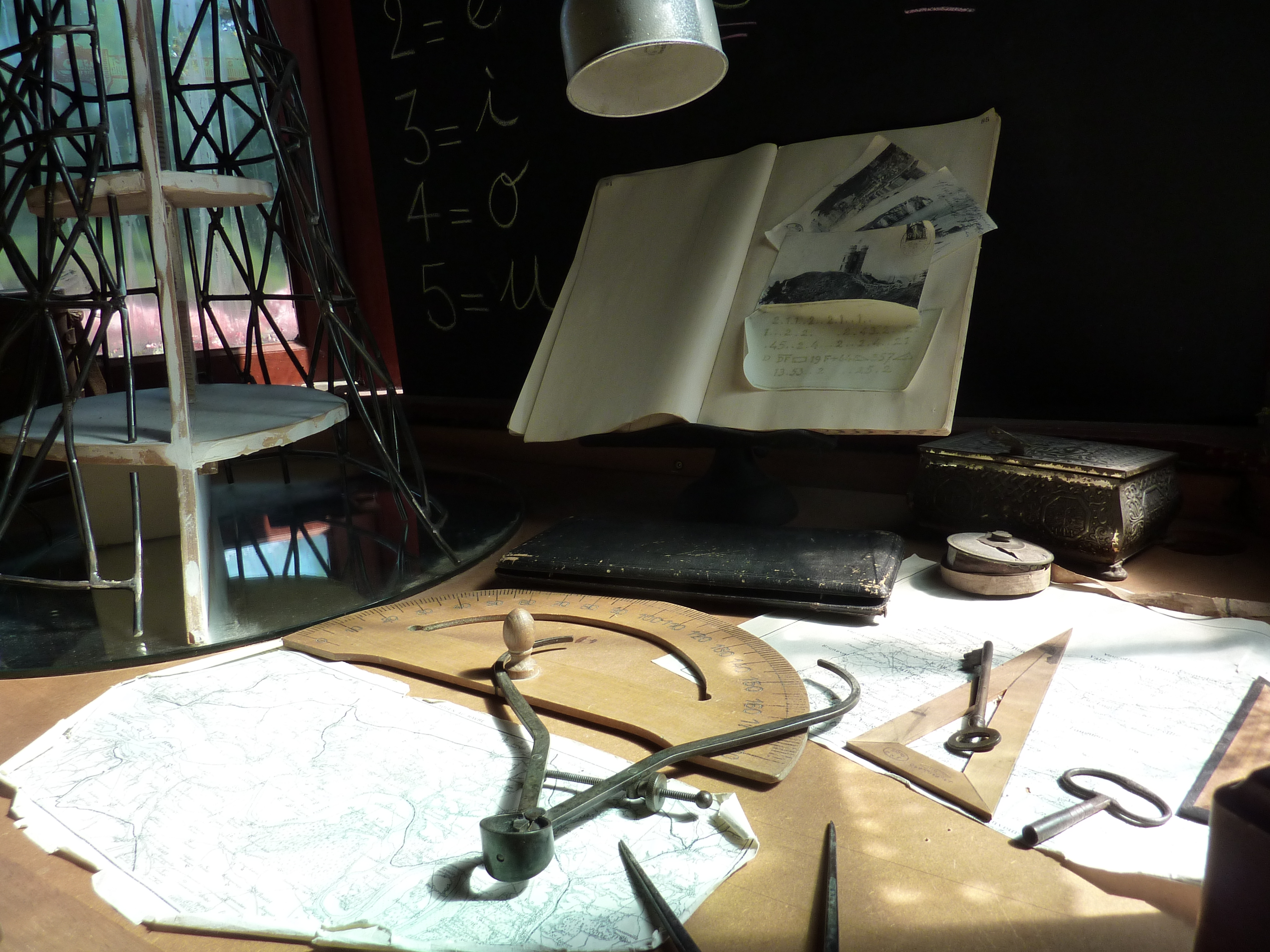 Ancienne maison de Maurice Leblanc, Étretat. Bureau dont les fenêtres donnent sur le balcon.